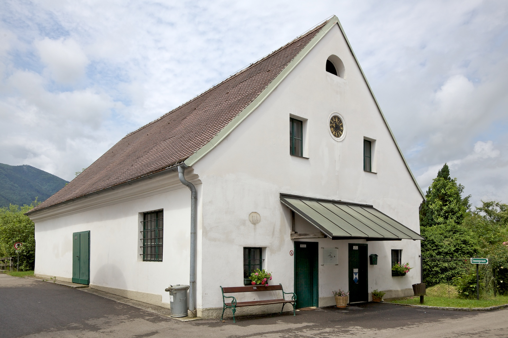 Kram der ehemaligen Sensenschmiede am Gries, heute OÖ. Sensenschmiedemuseum